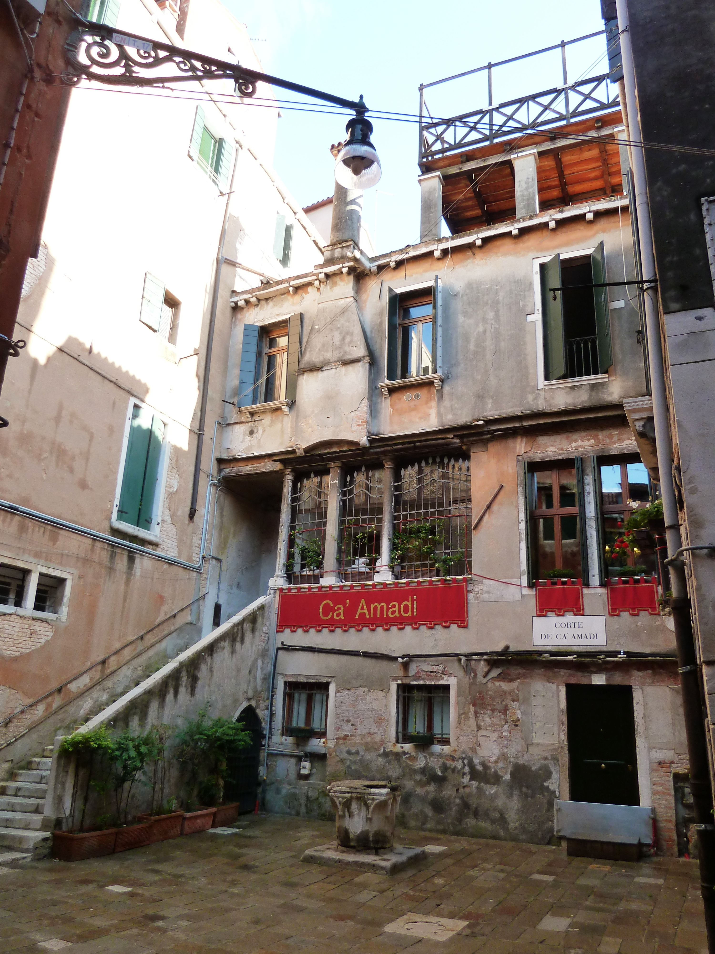 Palazzo Amadi (Venice)